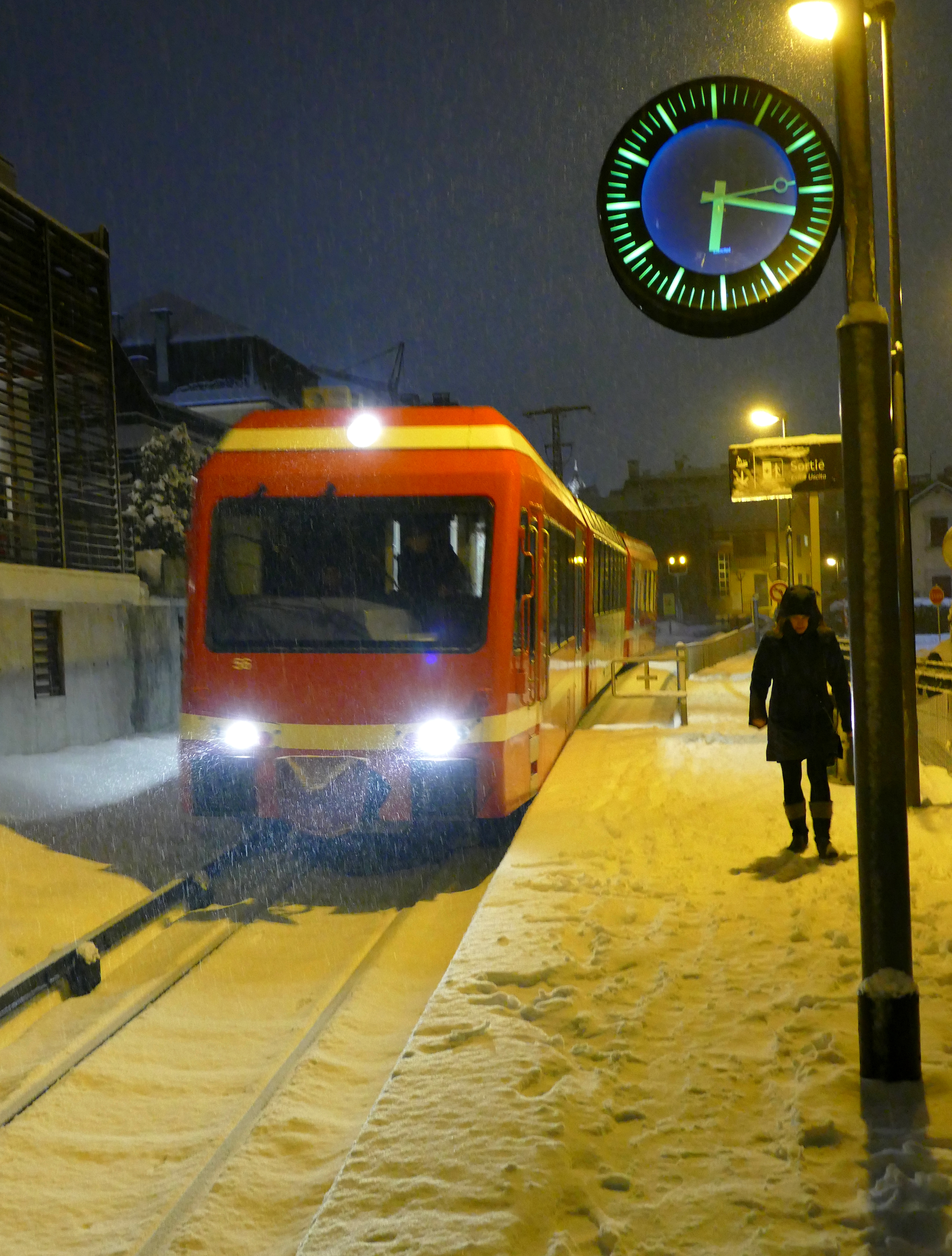 Arrivée du train en gare de Aiguille du Midi le 18 janvier 2018 à 18 h 17. Ligne Vallorcine - Saint-Gervais.